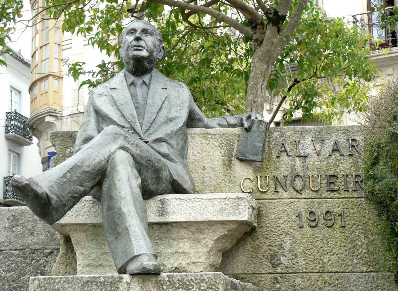 Mondoñedo - La Catedral basílica posee varios estilos, fue construida sobre bases románicas y góticas (siglos XIII y XIV), luego debido a las sucesivas ampliaciones y reformas se decoró con adornos barrocos, se remodeló la fachada y se añadieron las dos torres en el siglo XVIII. La estatua en bronce de Álvaro Cunqueiro en frente de la catedral.